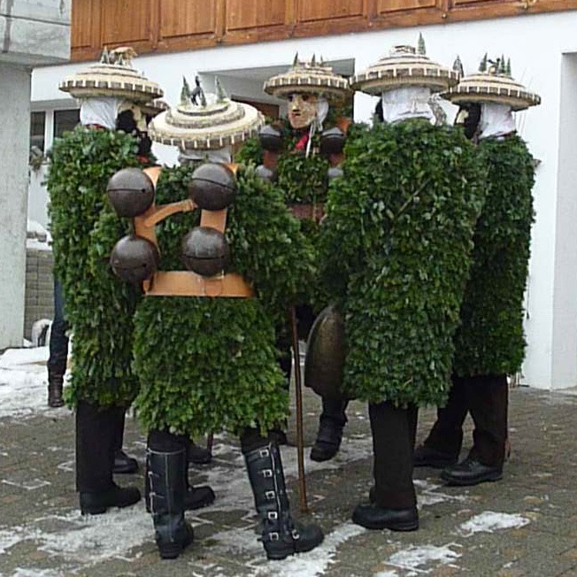 Silvesterkläuse in Urnäsch 1 (Kanton Appenzell, Schweiz)